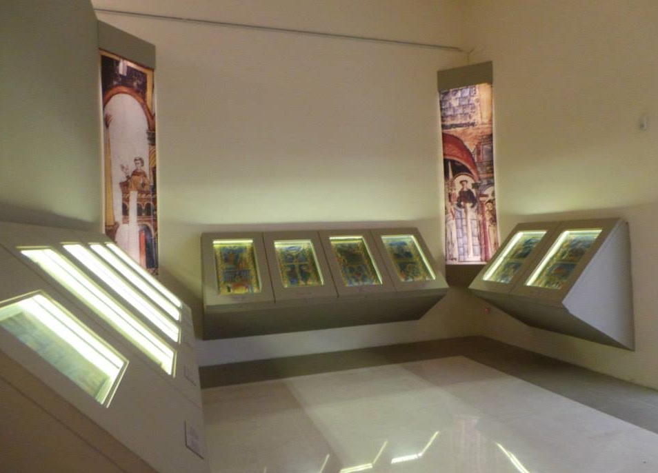 Il museo diocesano di salerno - sezione exultet